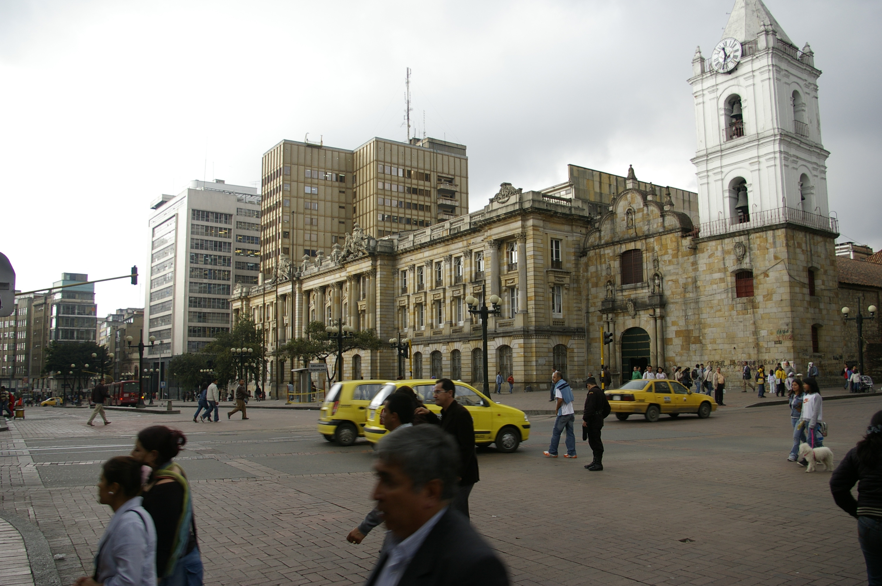 Avenida Jimenez